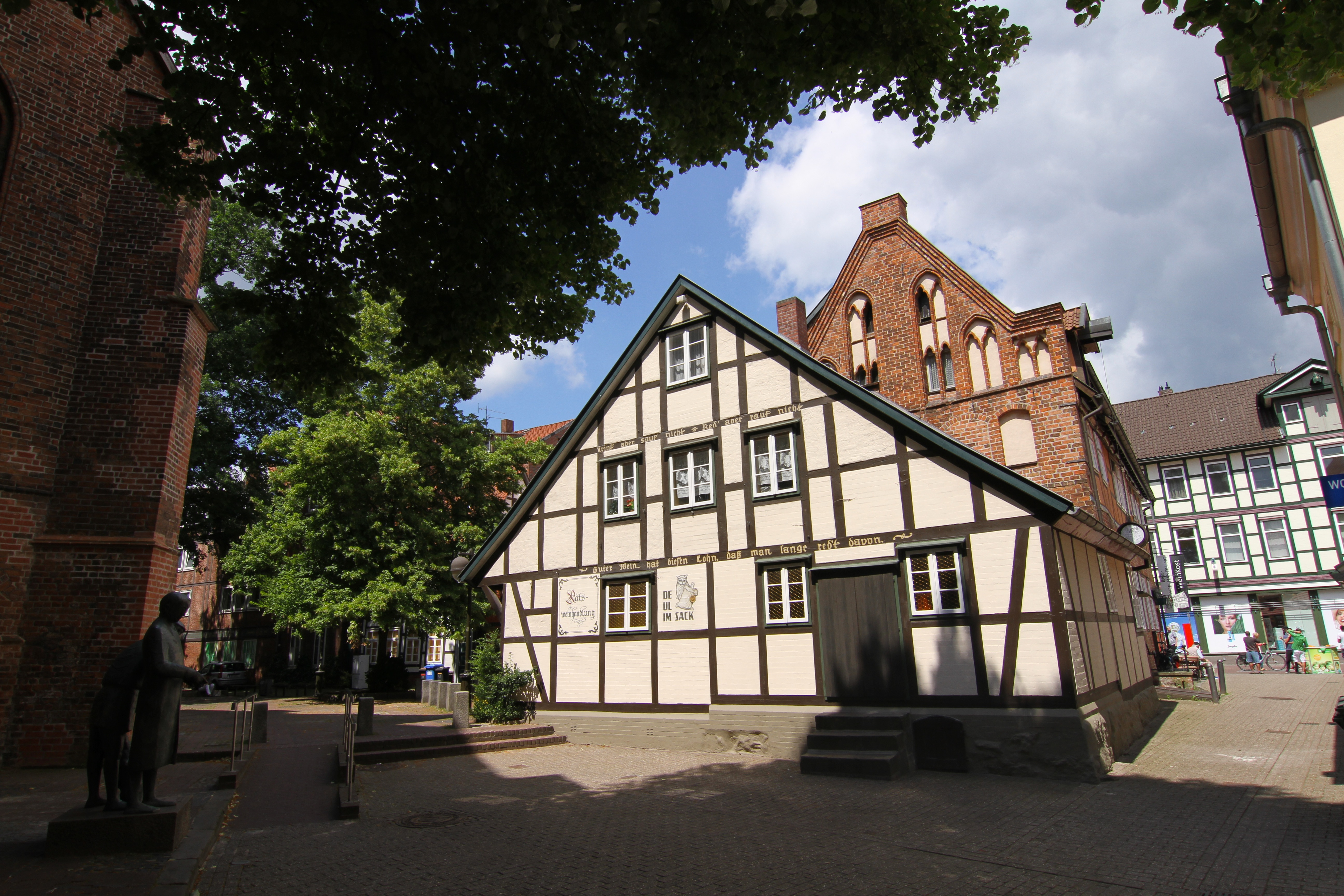 Backsteingiebel der Ratsweinhandlung